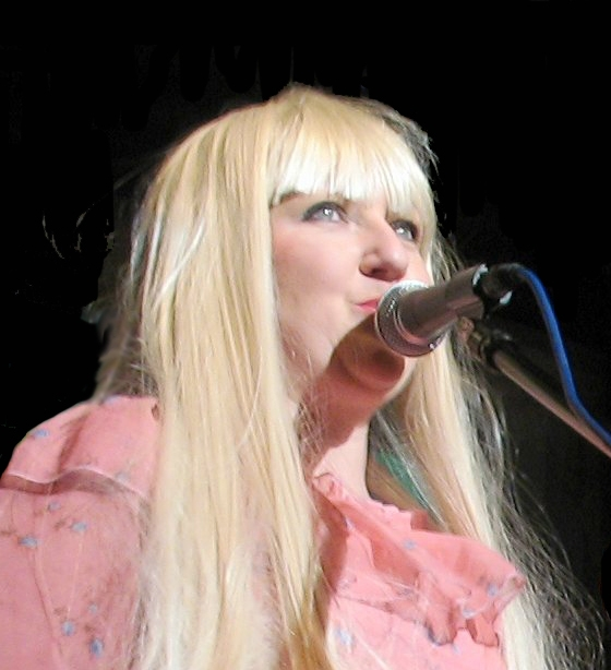 Agnieszka Litwin ("Marylka") ucharakteryzowana na Marylę Rodowicz.